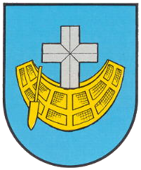 Das zweite der zwei Wappen von Schifferstadt im dt. Bundesland Rheinland-Pfalz